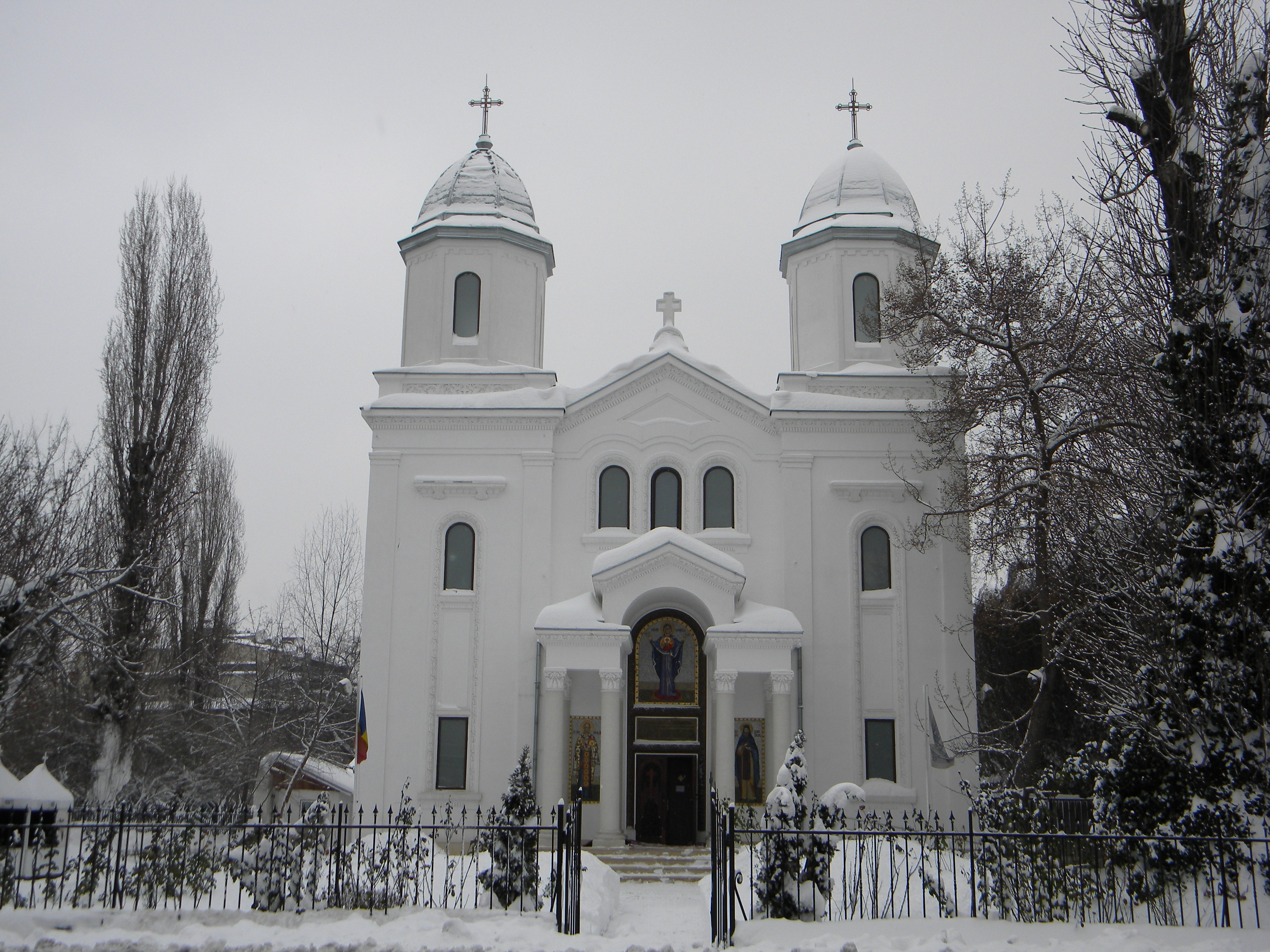 Bucuresti, Romania, Biserica Sf. Nicolae Tabacu, Str. Calea Victoriei